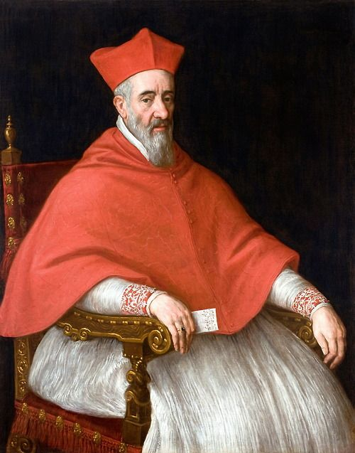 Ritratto del cardinale Giovanni Dolfin (1545-1622)